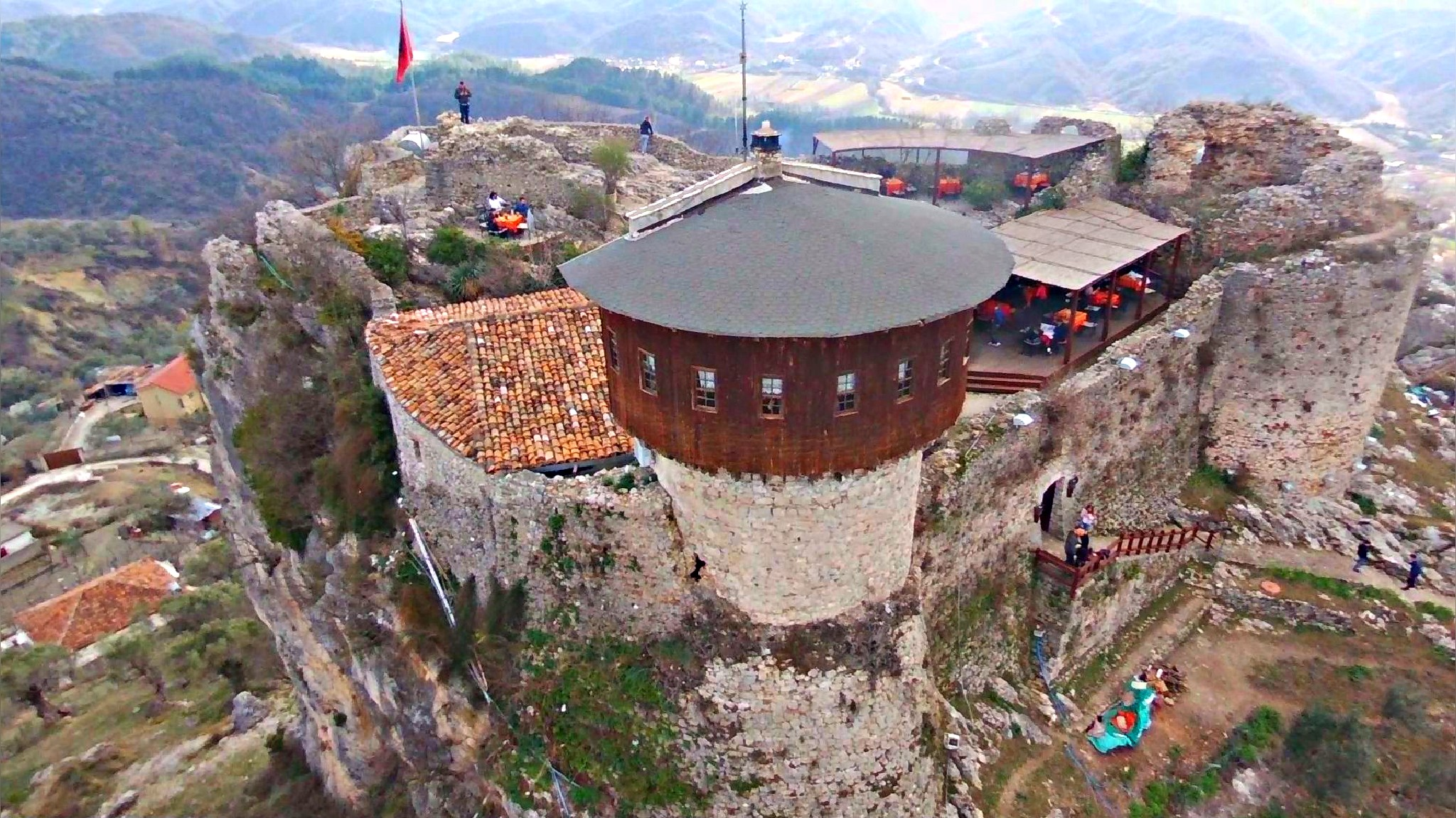 Foto e kapur me dron